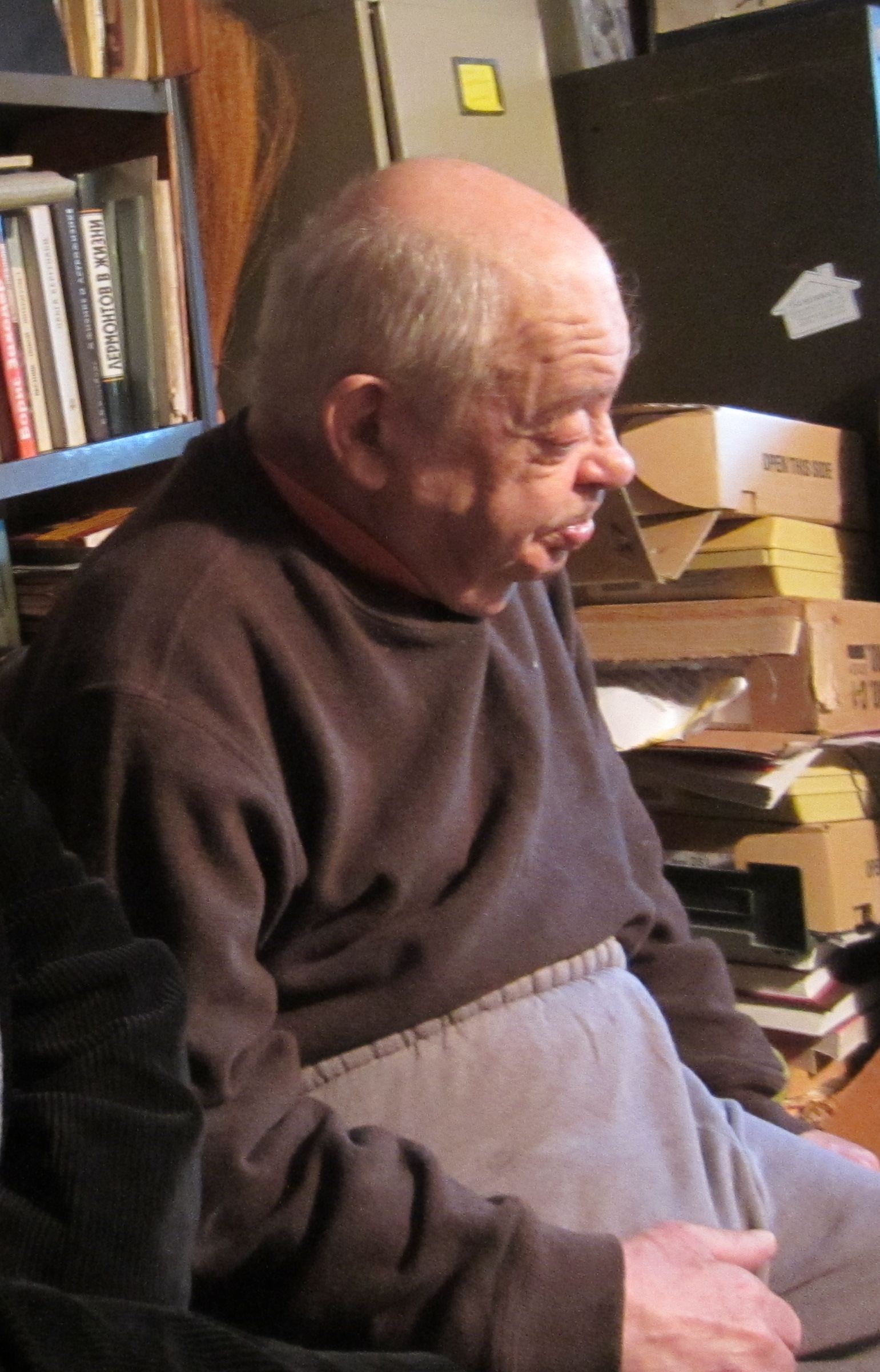 Слева направо поэты Михаил Л. Герштейн и Наум Коржавин, Бостон 2012